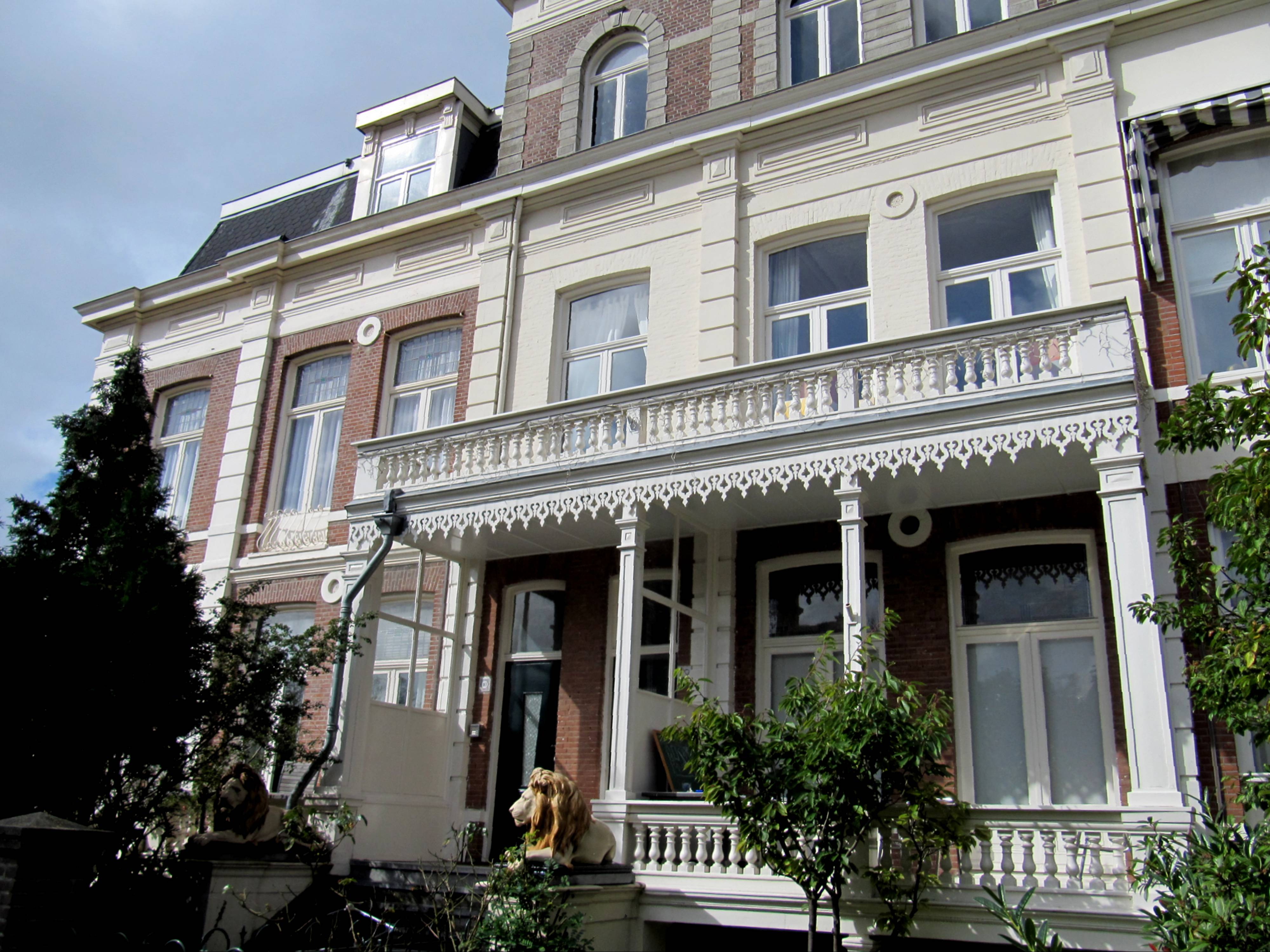 DenHaag Antwerpsestraat10 - Dubbel herenhuis, in oorsprong genaamd villa Agata, dat het middendeel vormt van het vrijstaande, op een duintop gesitueerde bouwblok Antwerpsestraat 6/8, 10/12 en 14/16, in 1886-1887 gebouwd door architect Johannes Hendriks Beetsma in eclectische bouwstijl. Het zijn de oudste herenhuizen in het Belgisch Park.